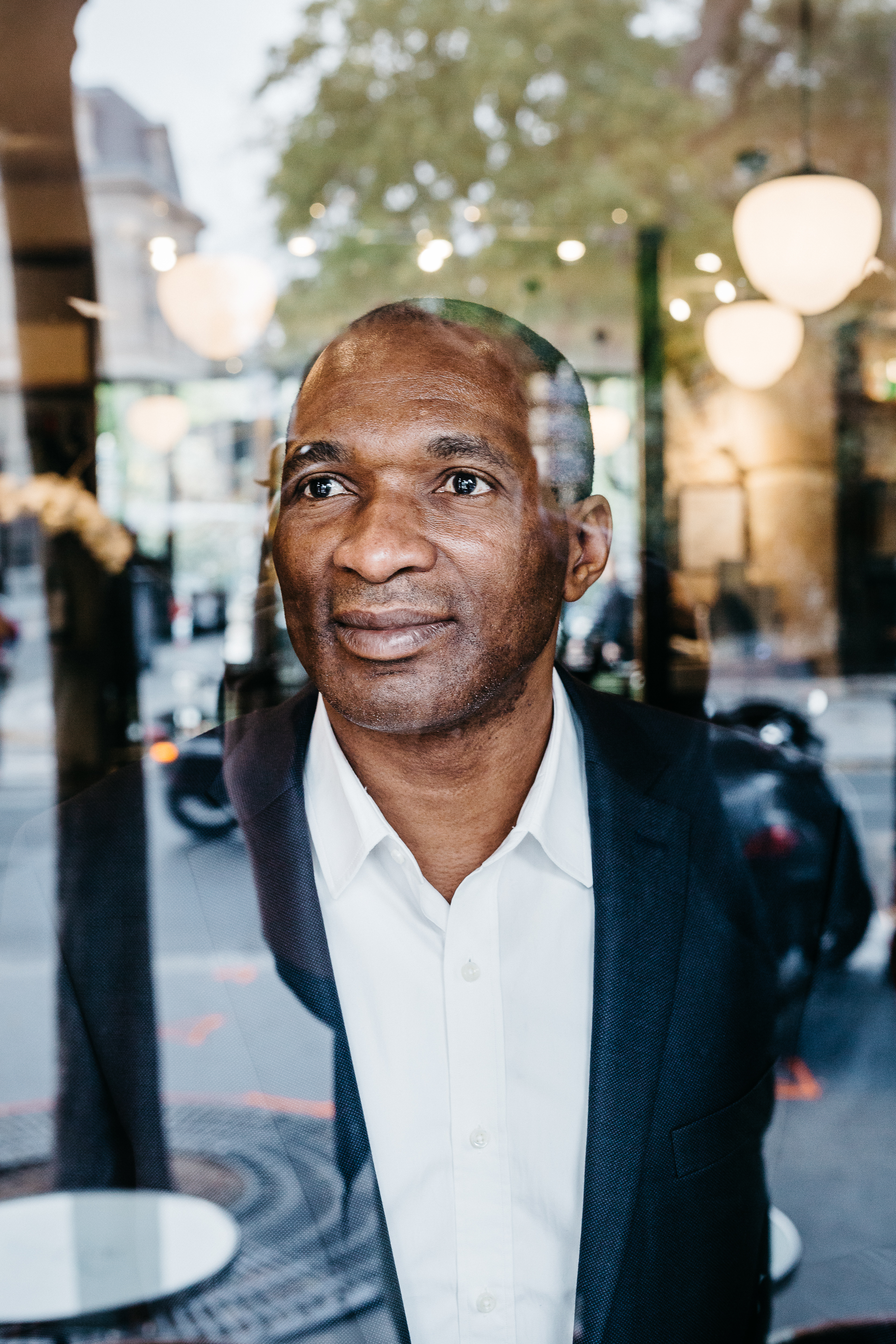 Portrait de Michel Thierry Atangana, 51 ans, français d'origine camerounaise emprisonné abritairement au Cameroun pendant 17 ans jusqu'à sa libération en 2014. Il est photographié dans la Mairie du 3éme arrondissement de Paris, dans le parc voisin et au restaurant café Le Sancerre le 14 octobre 2015 en prévision d'une campagne pilotée par MCBG Conseil pour que justice soit faite sur son incarcération.